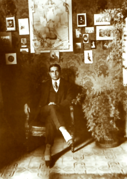 El escritor peruano Abraham Valdelomar en su masnsión de Barranco. Lima, 1916.